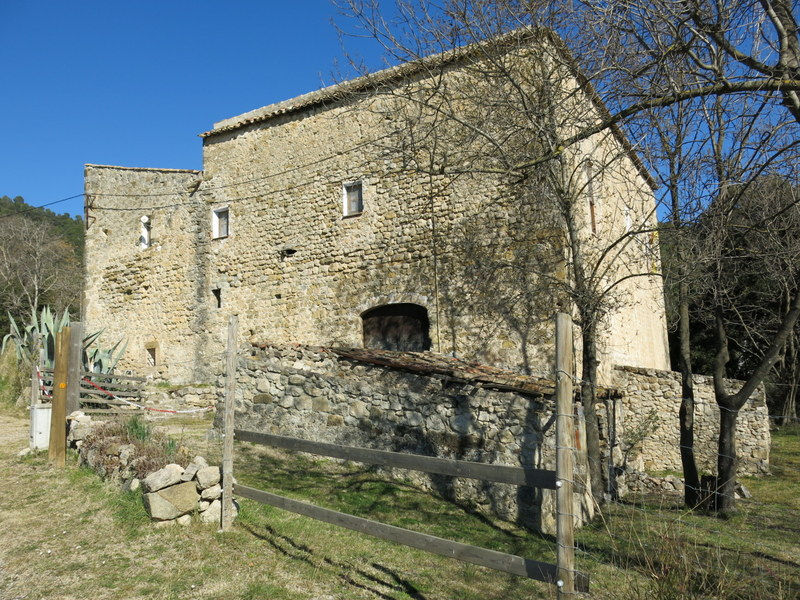 Castell de Segueró - Beuda / Garrotxa- Catalunya